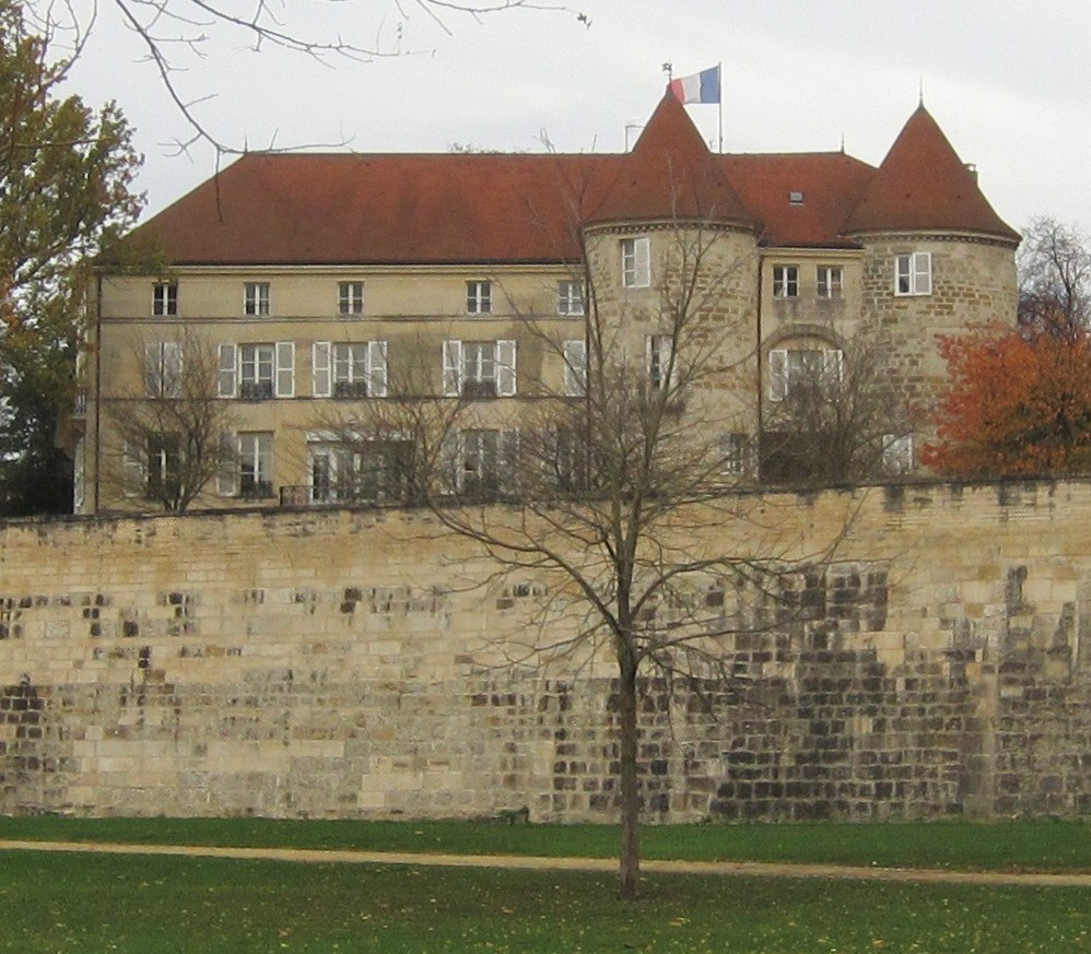 Description